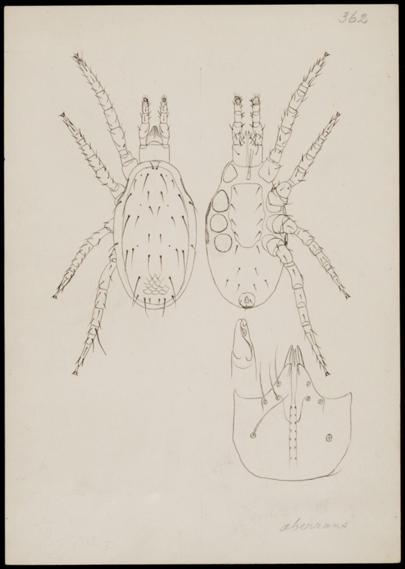 Typhlodromus aberrans (Oudemans)